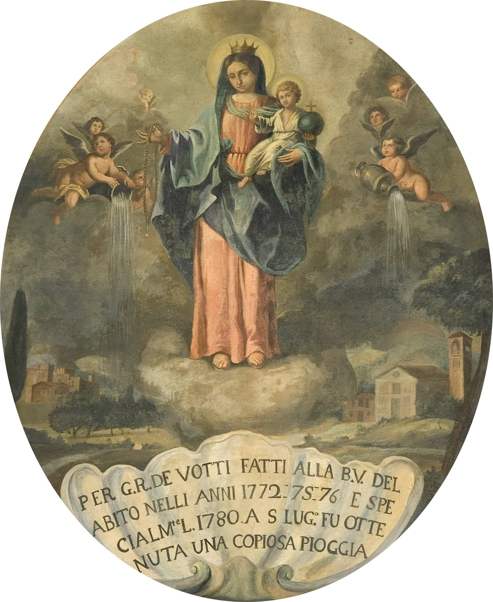 Ex-voto alla Madonna dell'Abito datato 1772